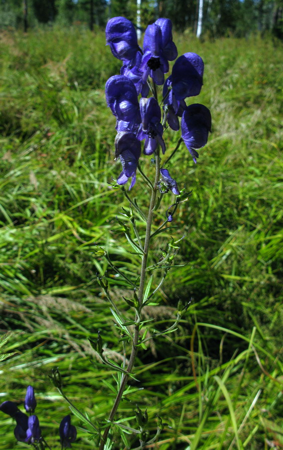 Цветущее растение борца байкальского на низинном болоте в окр. пос. Танзыбей, Красноярский край, Ермаковский район.